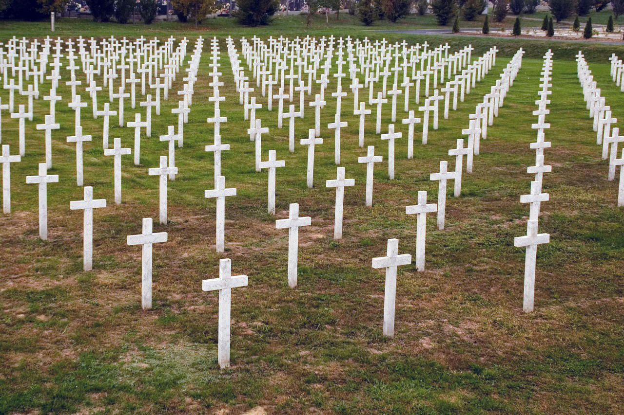 Memorijalno groblje u Vukovaru